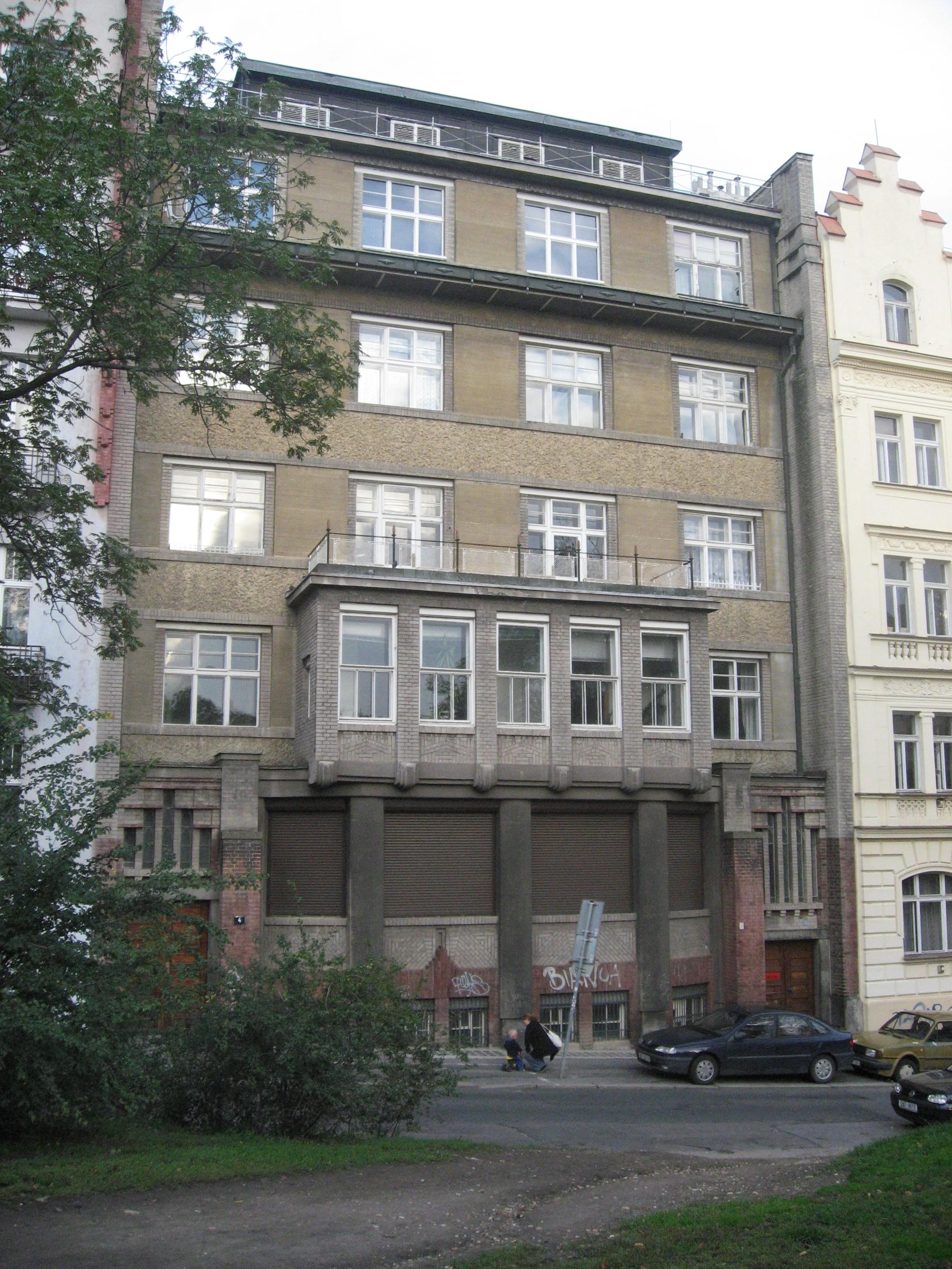 Chopinova 4, sídlo nakladatelství Paseka